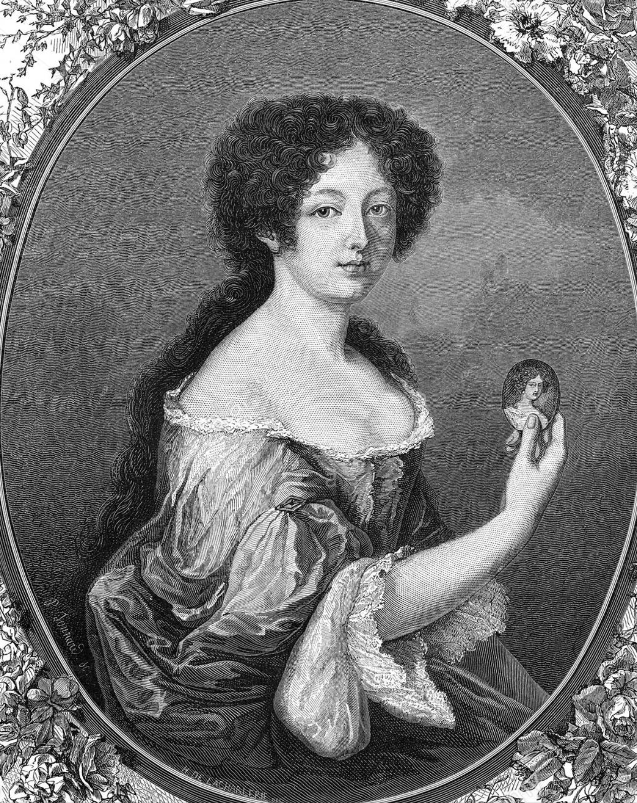 Portrait de Gabrielle de Rochechouart, Marquise de Thianges et soeur aînée de Madame de Montespan.